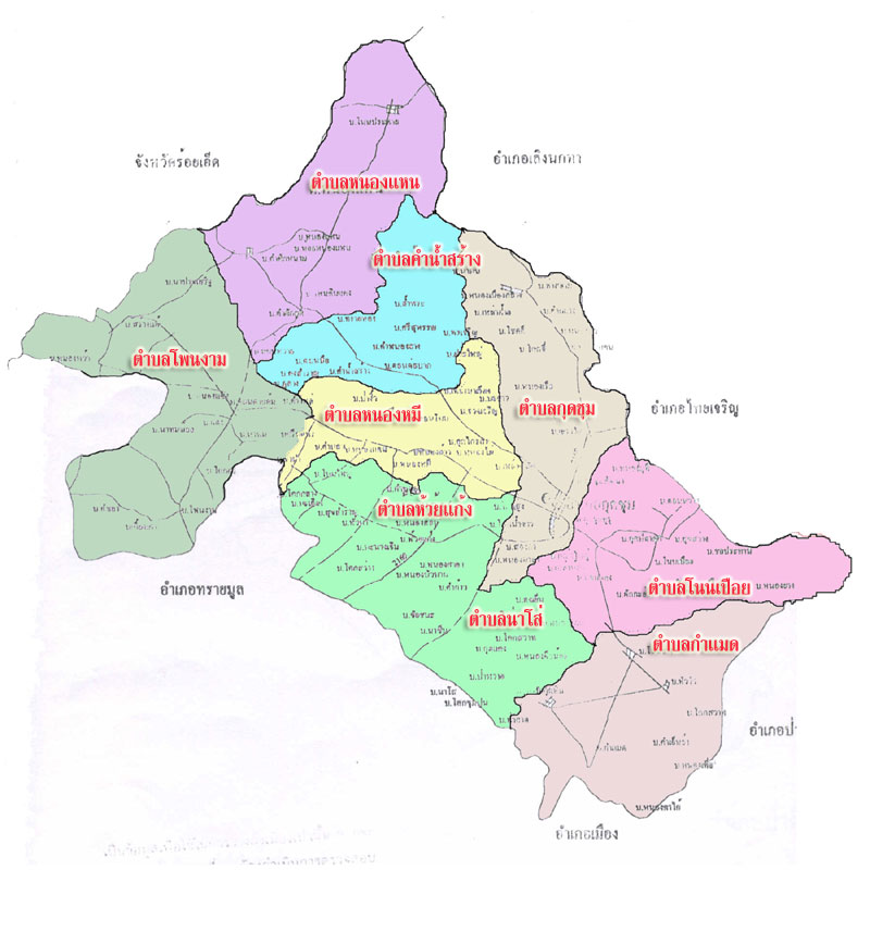 แผนที่อำเภอกุดชุม-สำนักงานพัฒนาชุมชน